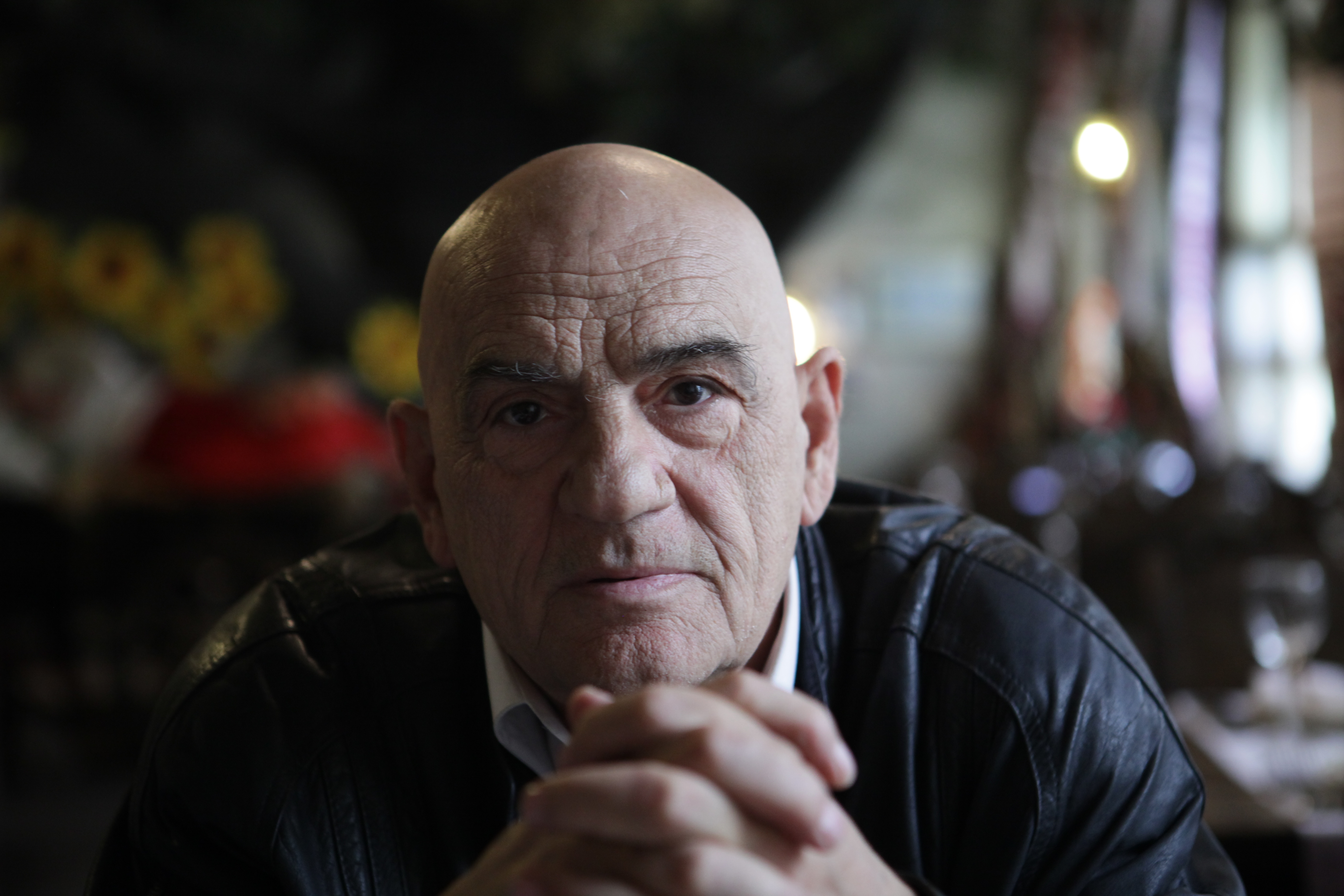 профессор Норенко Владимир Васильевич